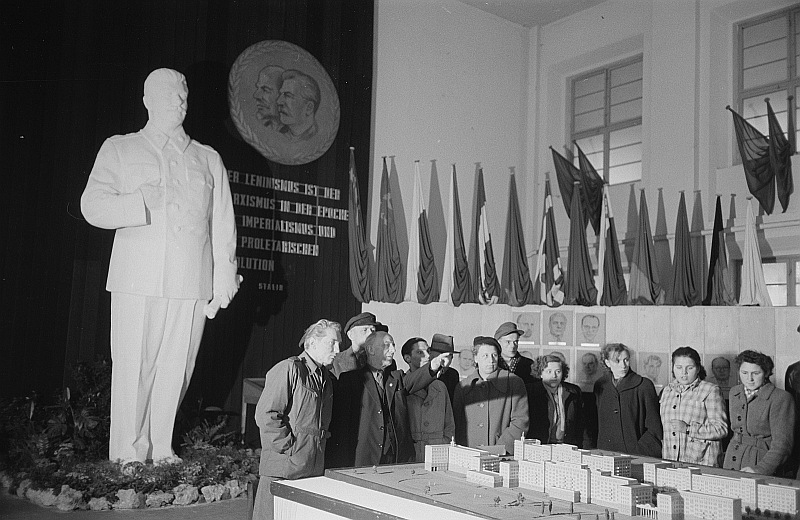 Original image description from the Deutsche FotothekBlick in die Halle mit einer Statue von Stalin und einem Modell der Stalinallee